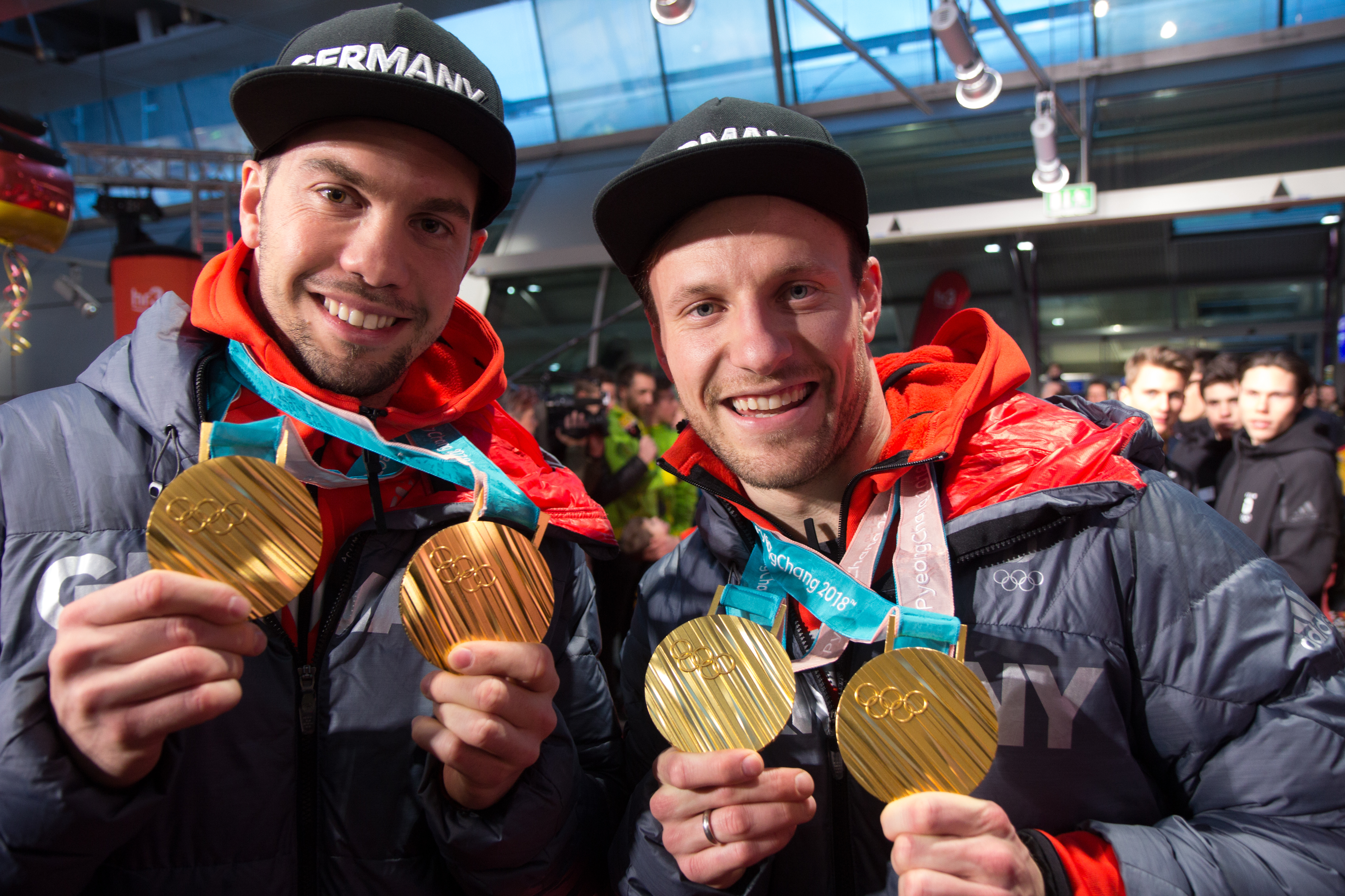 Ankunft der deutschen Olympiamannschaft am 26. Februar 2018 mit Flug LH713 auf dem Frankfurter Flughafen.